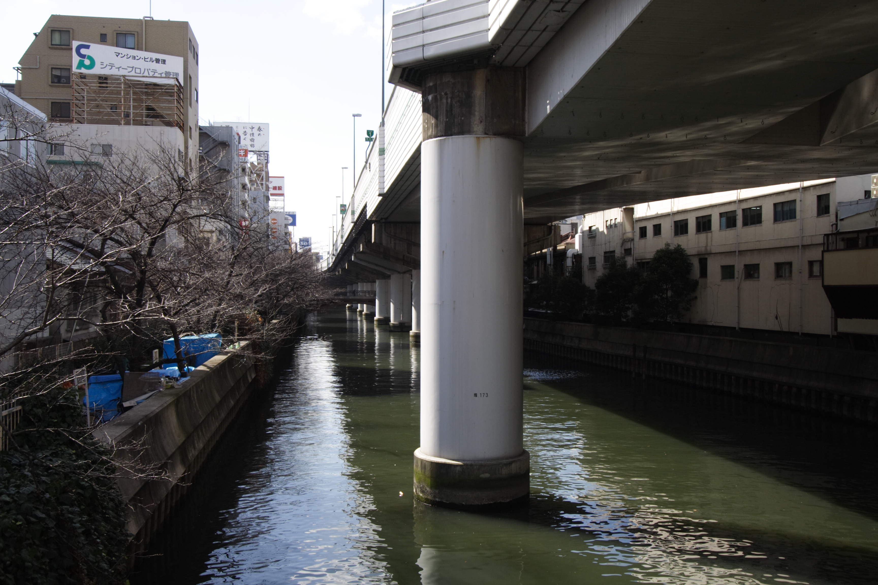 東横堀川(大阪市, 日本)